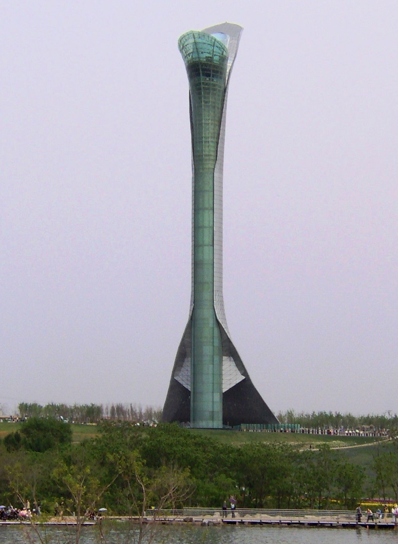 Shenyang 世博园